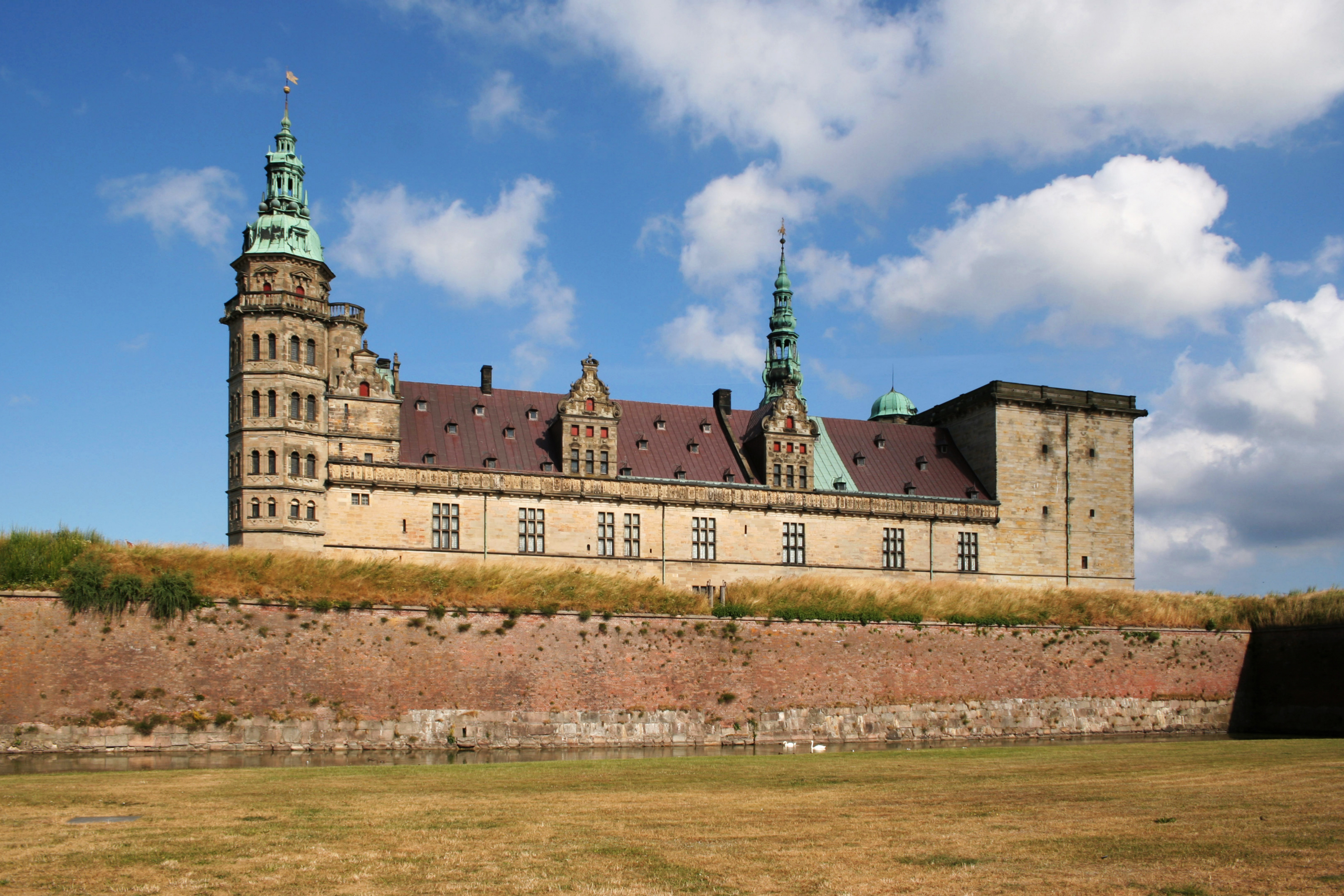 Hamlets Schloss – Schloss Kronborg in Helsingør, Dänemark